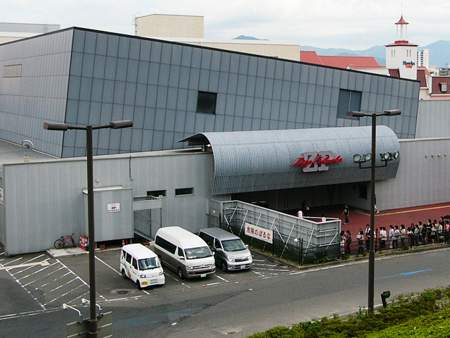 投稿者が撮影。Zepp Fukuoka（ホークスタウンモール内に開設された初代）。